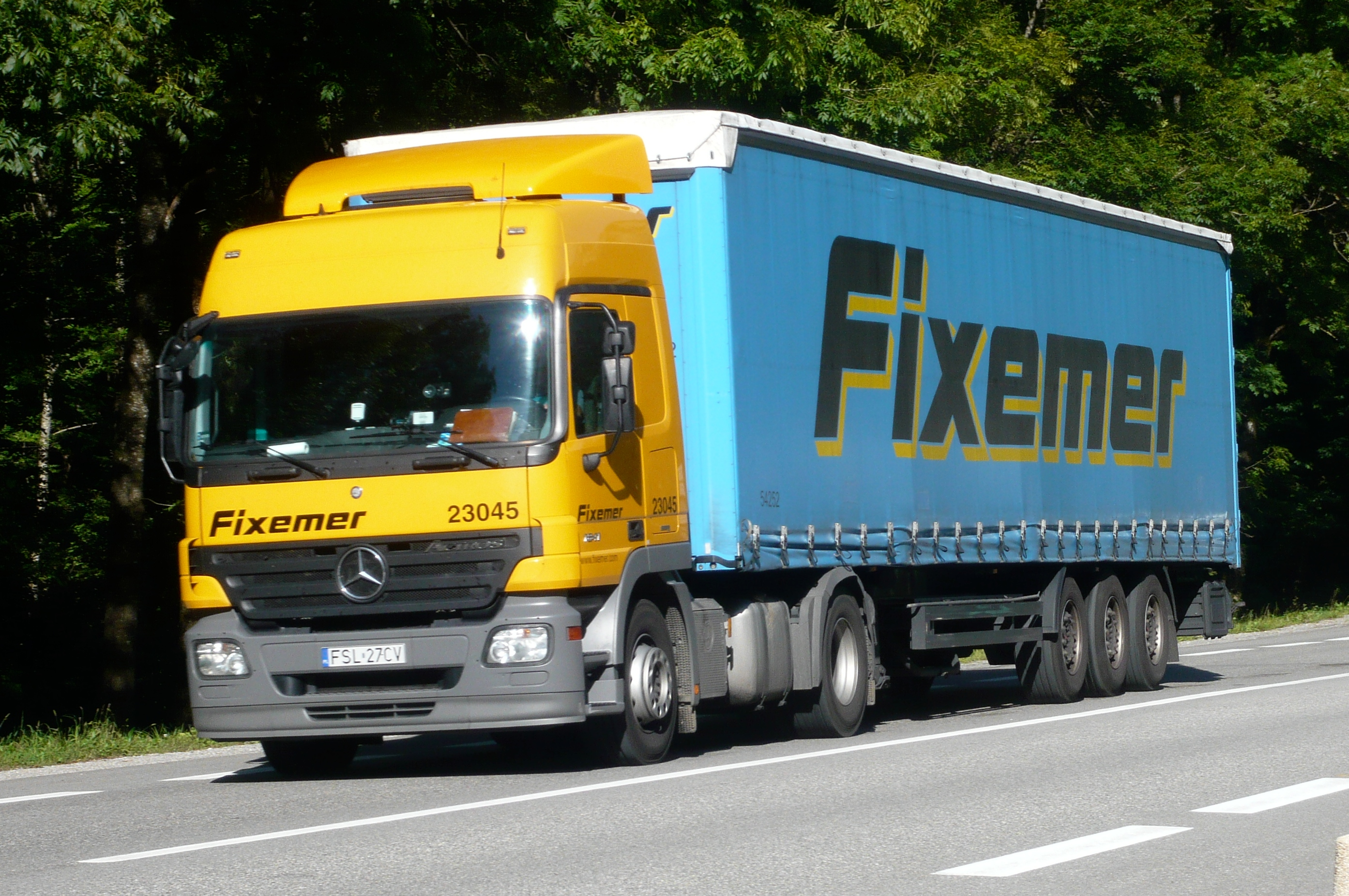 Mercedes-Benz Actros Truck (2008, Poland)